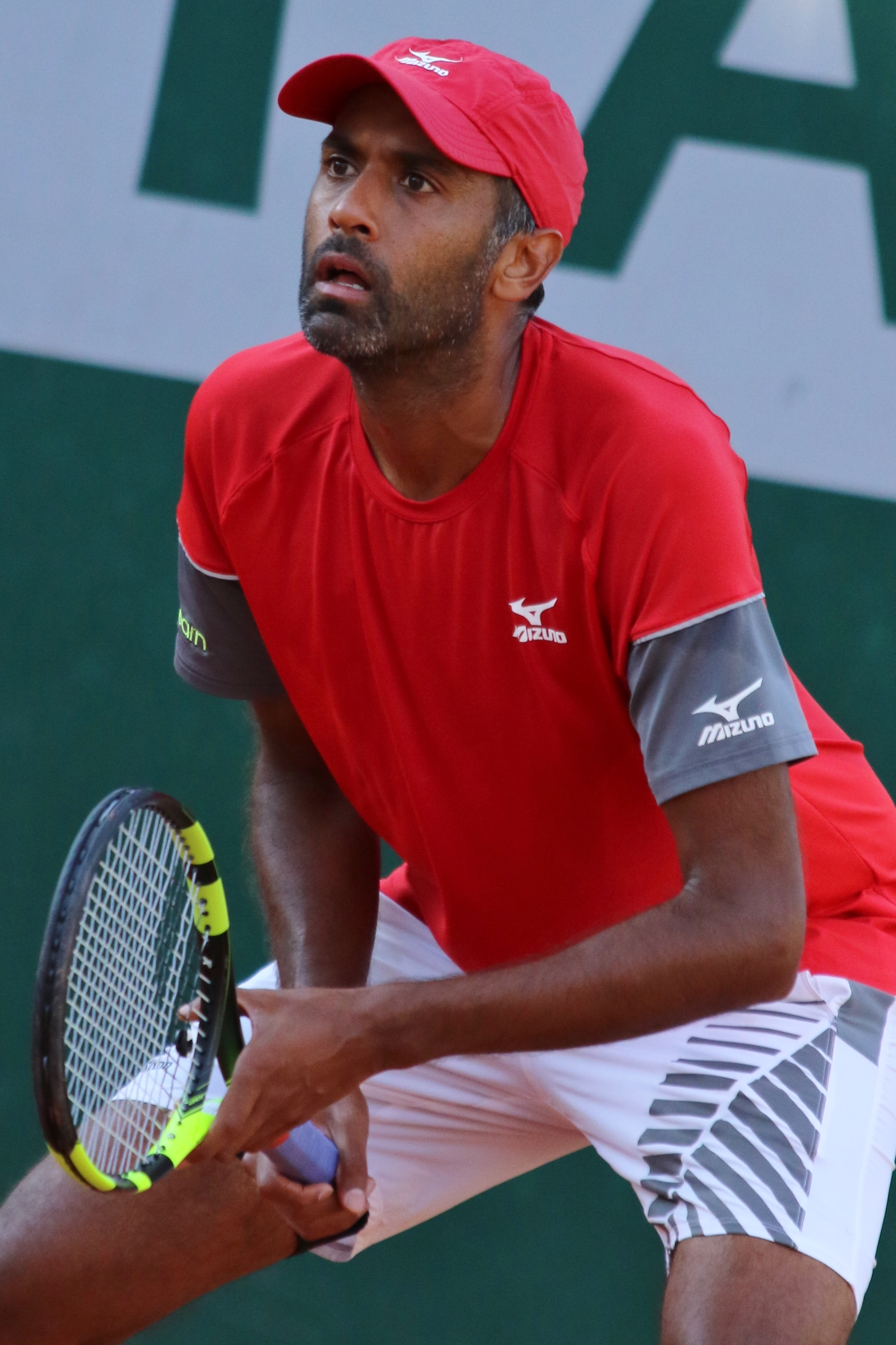 Ram RG18 (9)